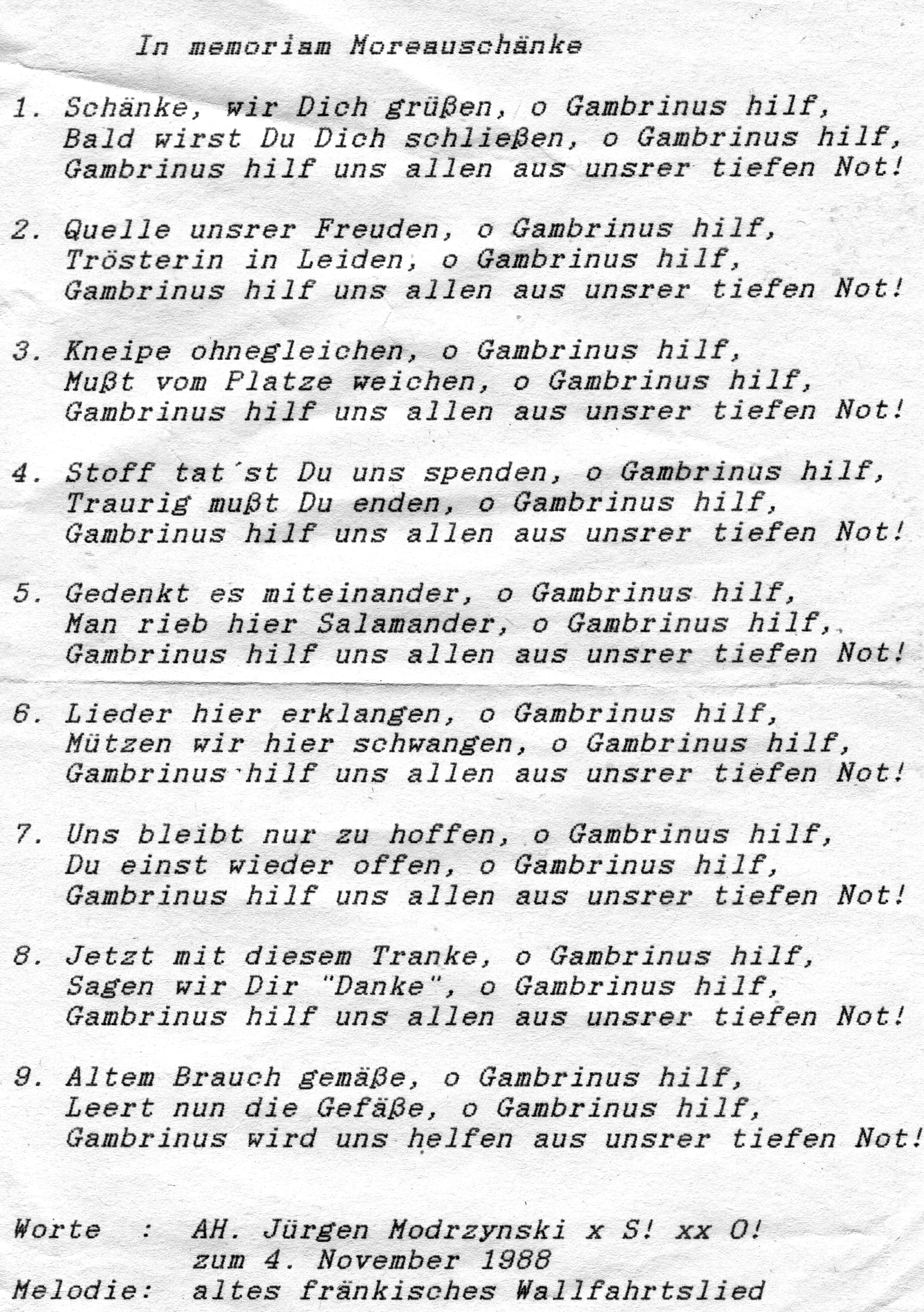 Liedtext zur Schließung der Moreauschänke, die Moreauschänke in Dresden war eine wichtige Kneipe für DDR-Studentenverbindungen